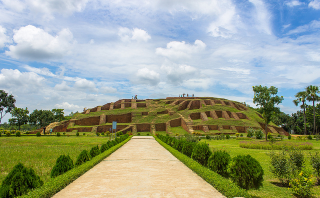 mohostangor